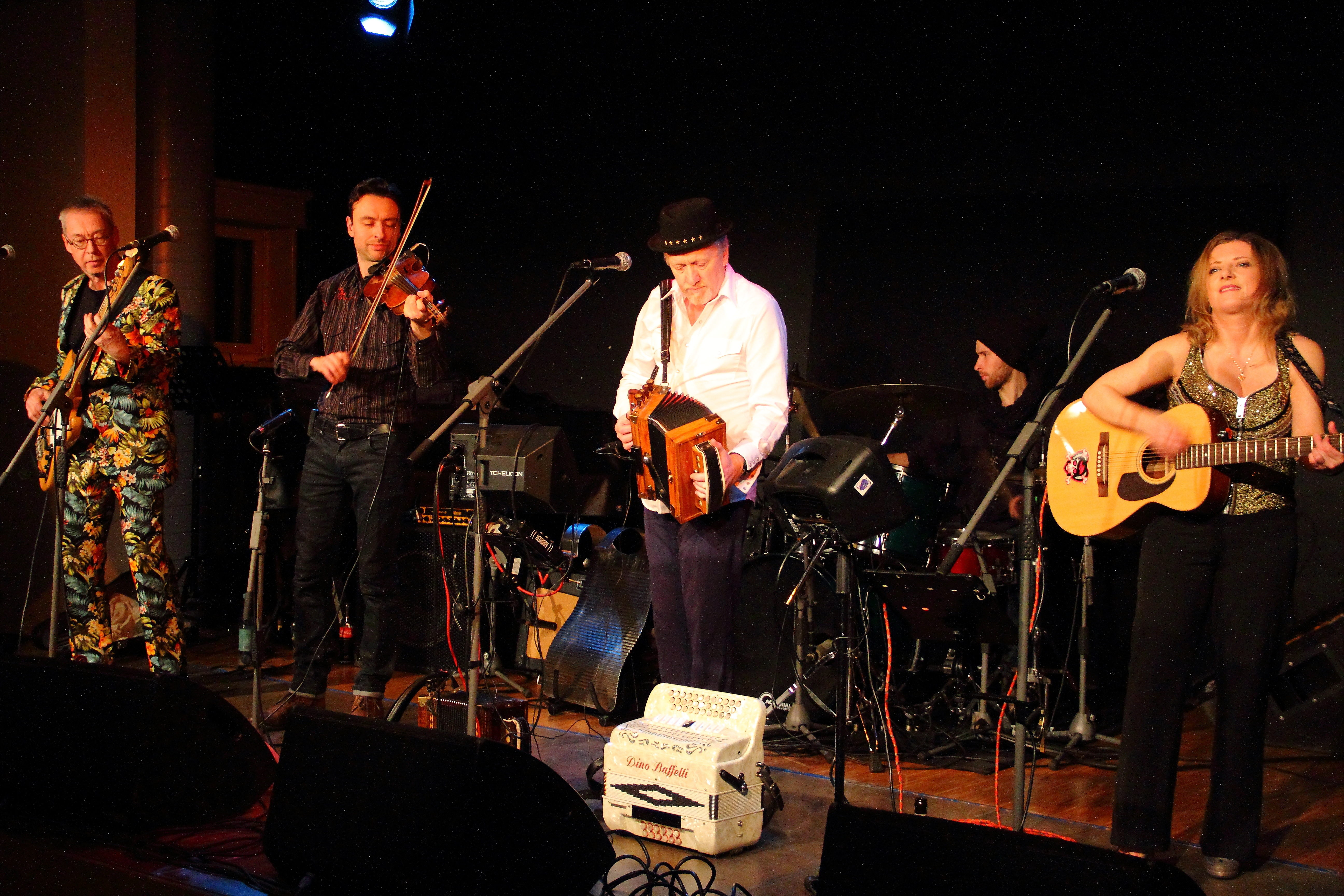 Die Cajun Roosters im KULT in NIederstetten.